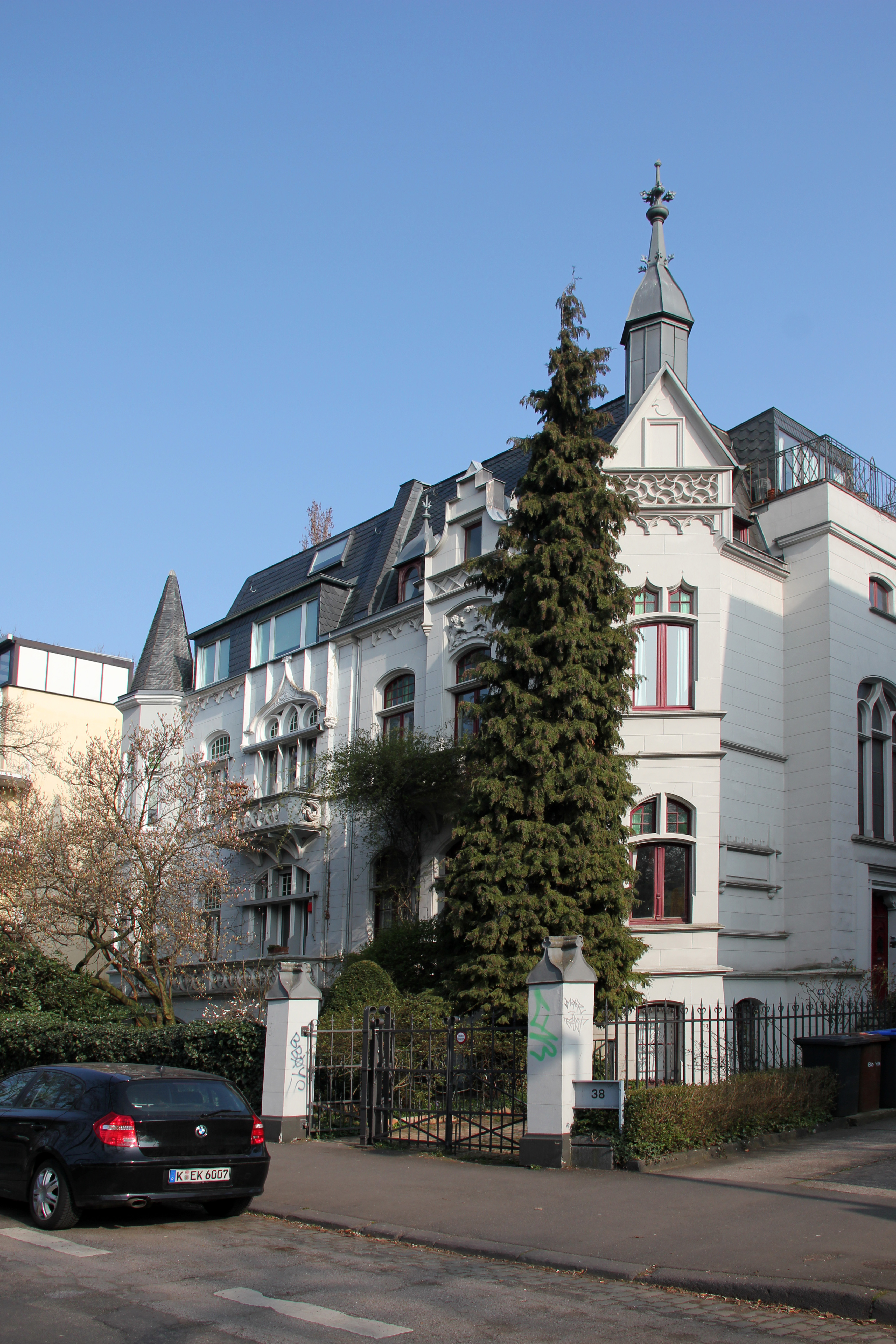 Köln, Volksgarten Straße 40